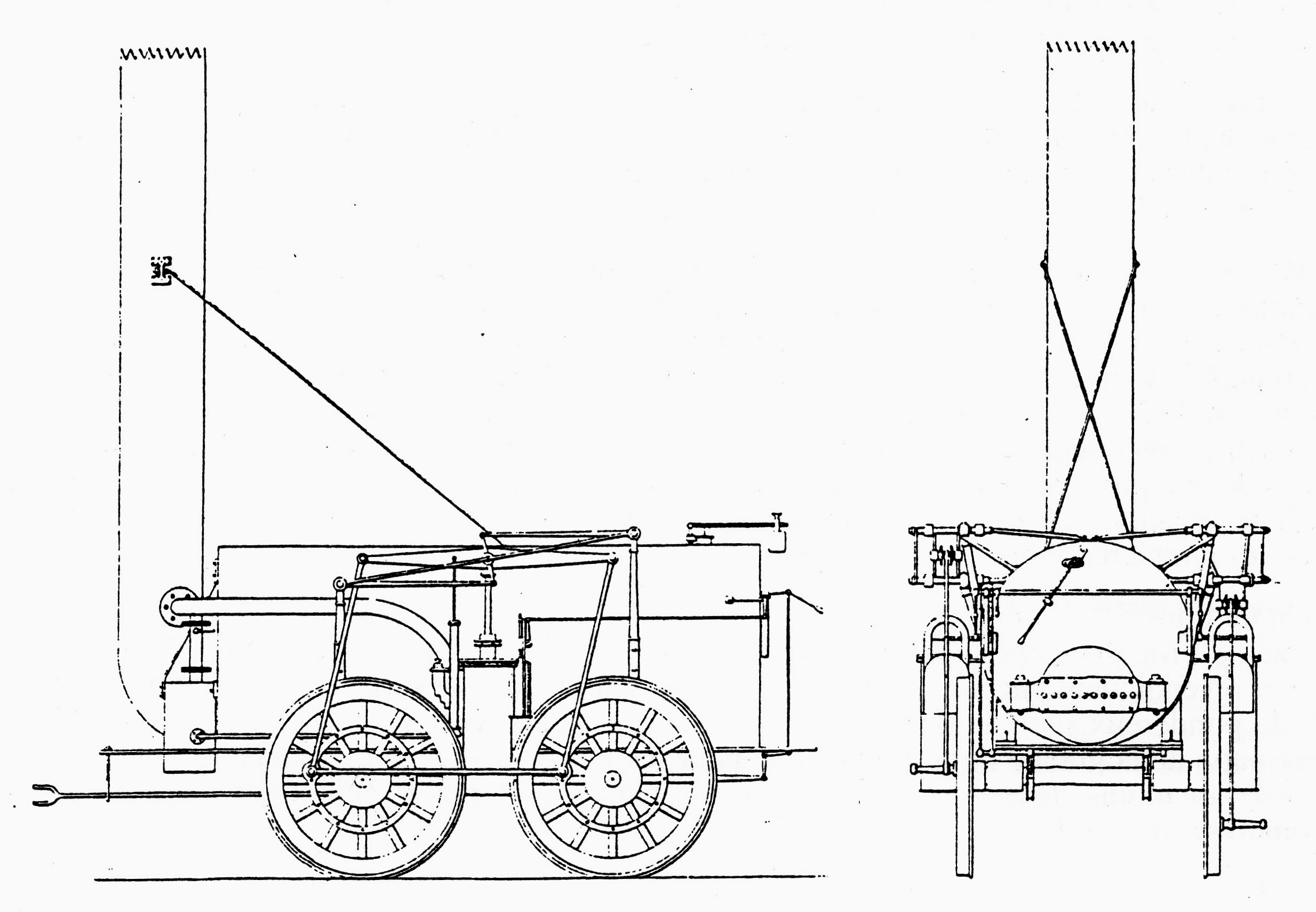 Locomotive Stephenson 1828